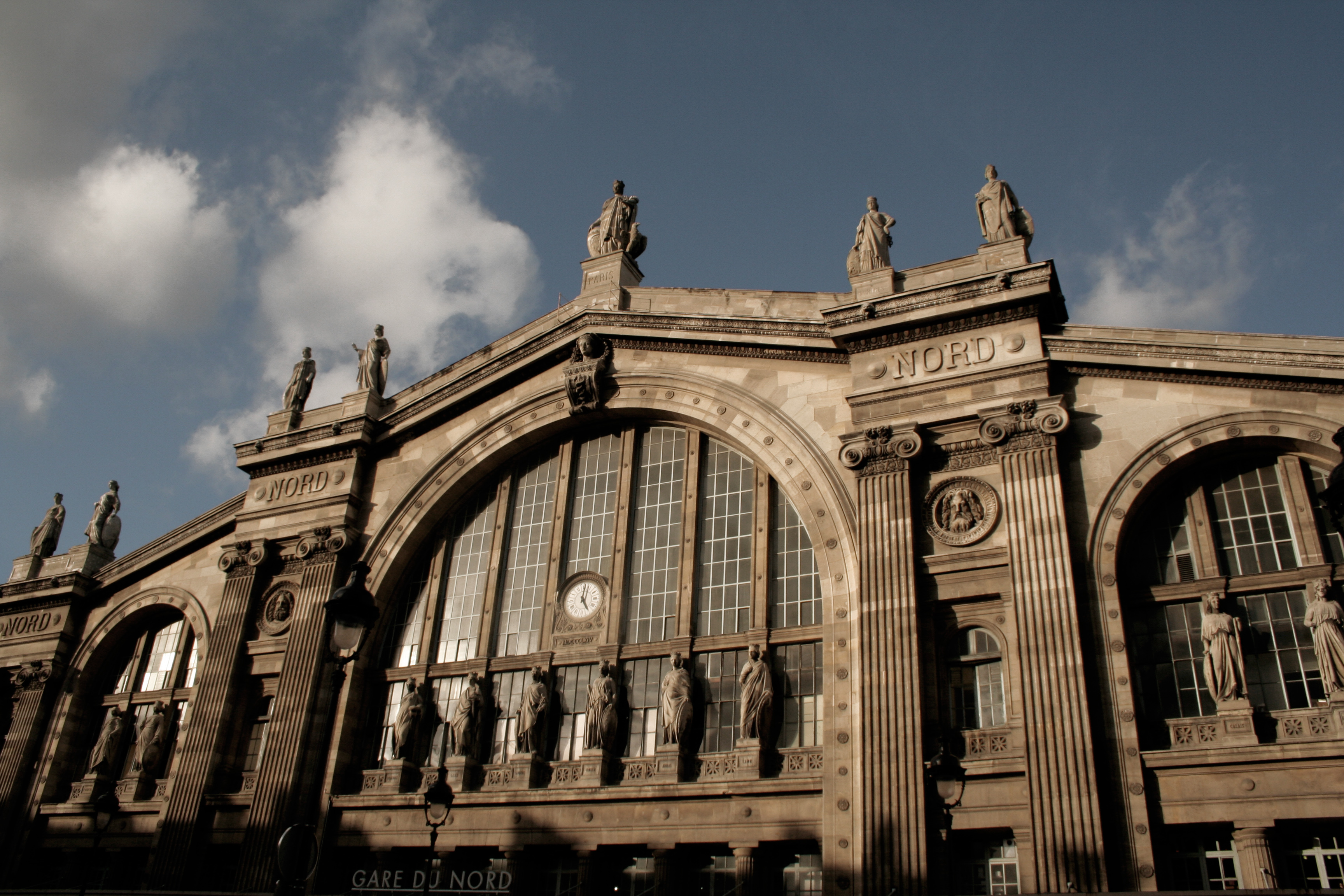 Façade de la gare du Nord (Paris, France).